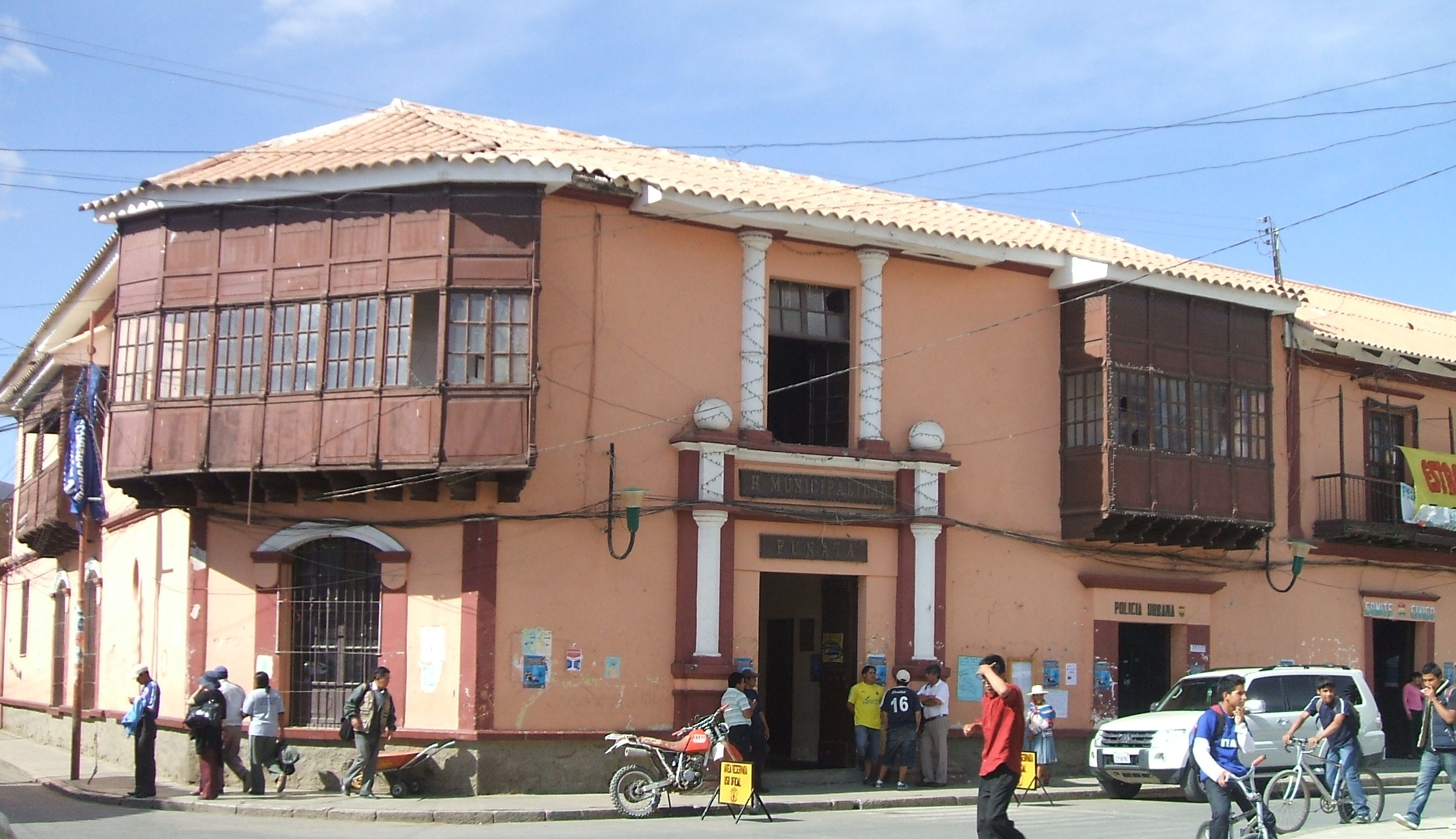 Honorable Alcaldía Municipal de Punata, que sirvio como casa de cabildo y casa consistorial